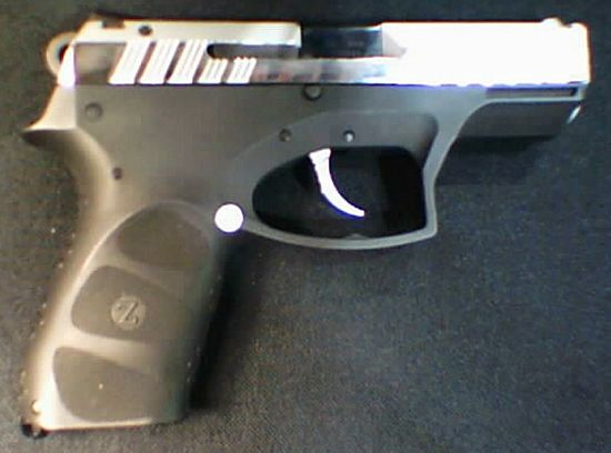 Pistola Fabricada por CAVIM